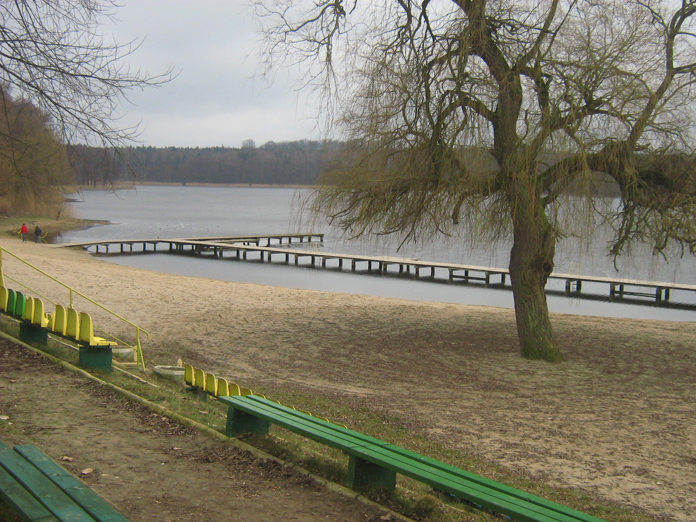 Plaża w Golczewie